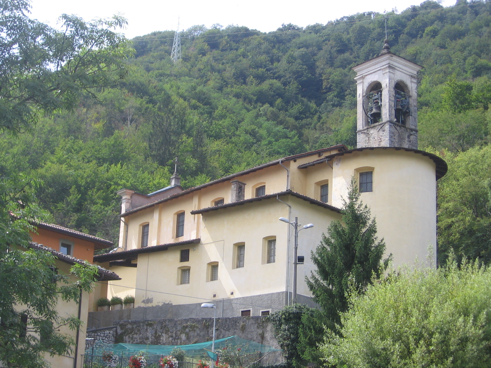 Camerata Cornello, Bergamo, Italy